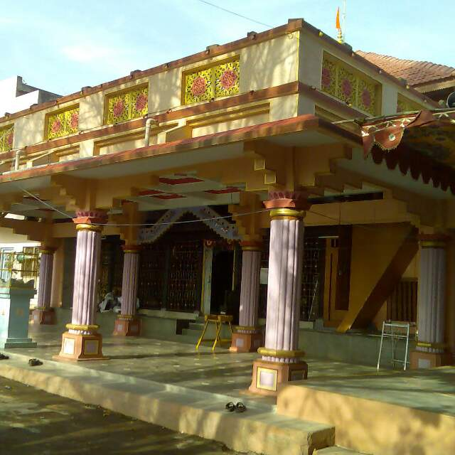 विठ्ठल मंदिर विठे गाव